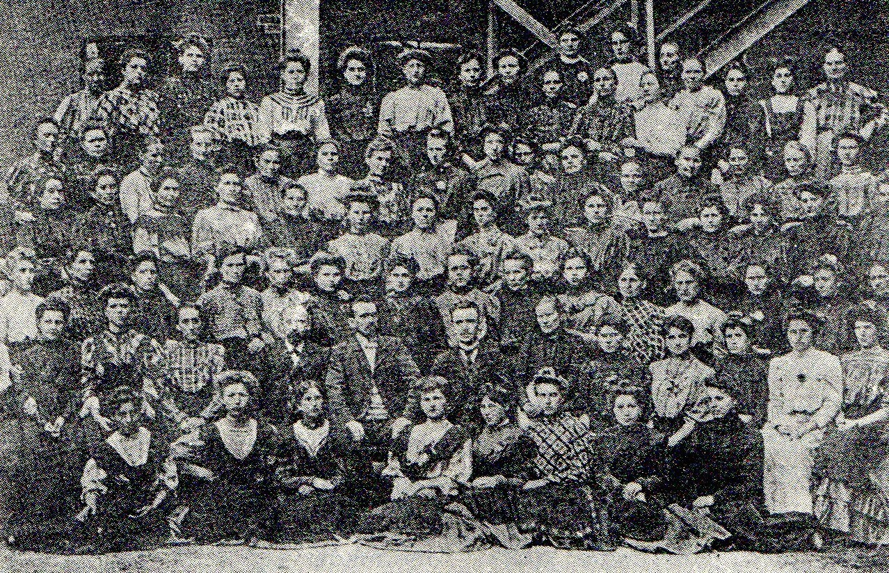 Żyrardowskie szpularki i szpularze - przełom XIX i XX wieku.